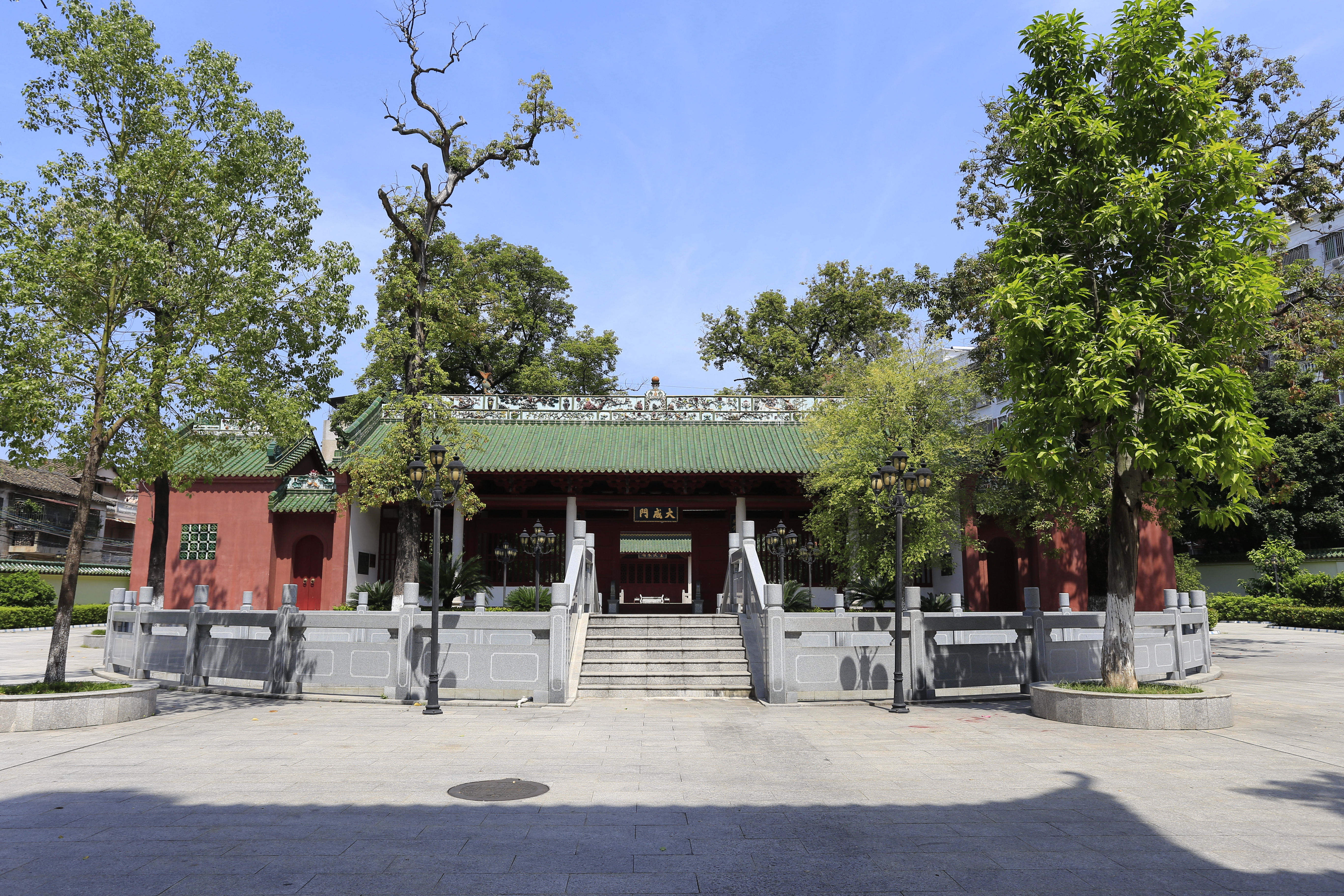 梅州学宫